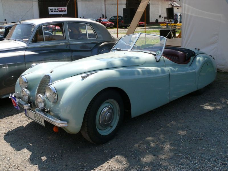 jaguar xk 140 na srazu veteránů Lešno 2007 (foto by Denis Katsaros) Na obrázku se nejedná o typ XK 140, ale o typ XK 120 vyráběný v letech 1948-1954. (Tomas Barnet)